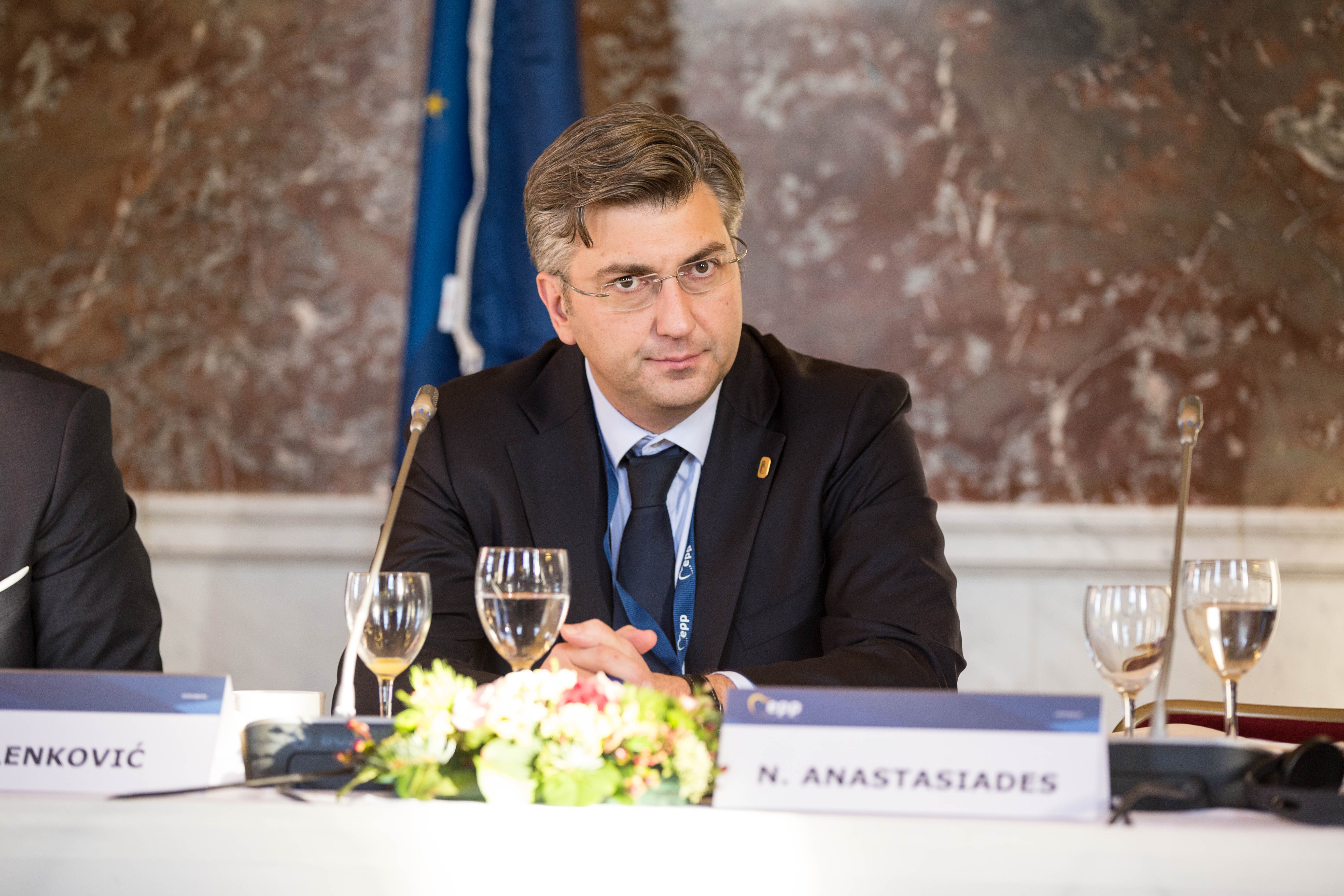 EPP Summit, Brussels, December 2016